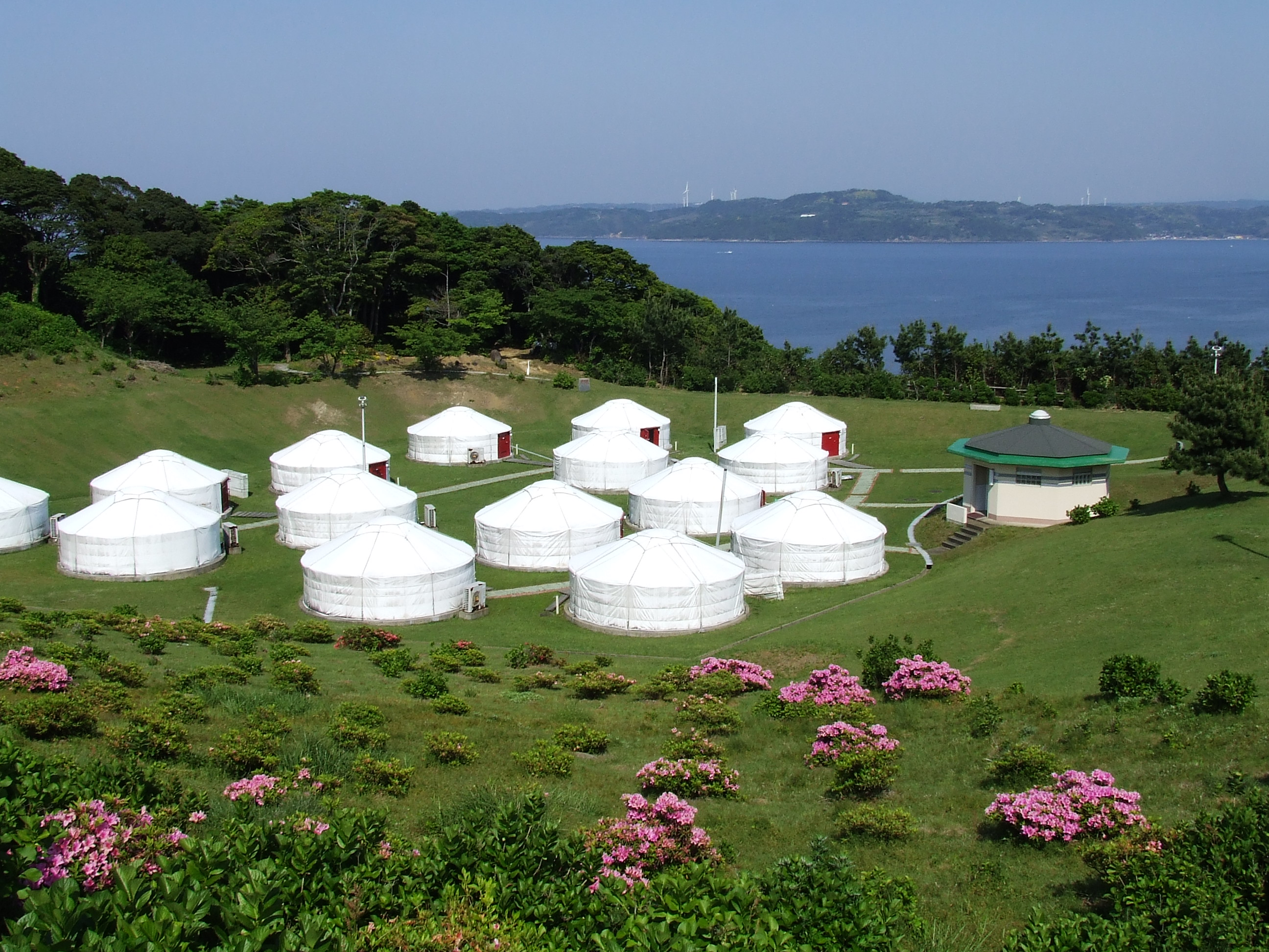 鷹島モンゴル村のゲル村